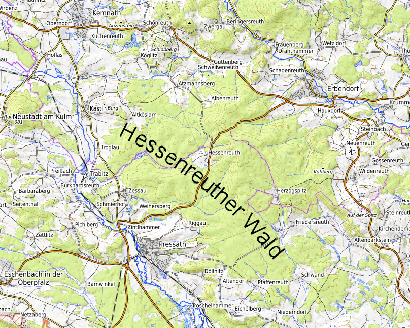 Das Waldgebiet zwischen Erbendorf, Pressath und Kemnath ist eines der schönsten Wandergebiete in der nördlichen Oberpfalz.